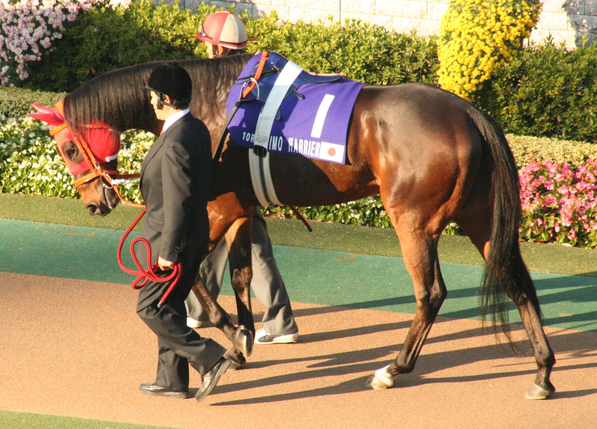 エリモハリアー